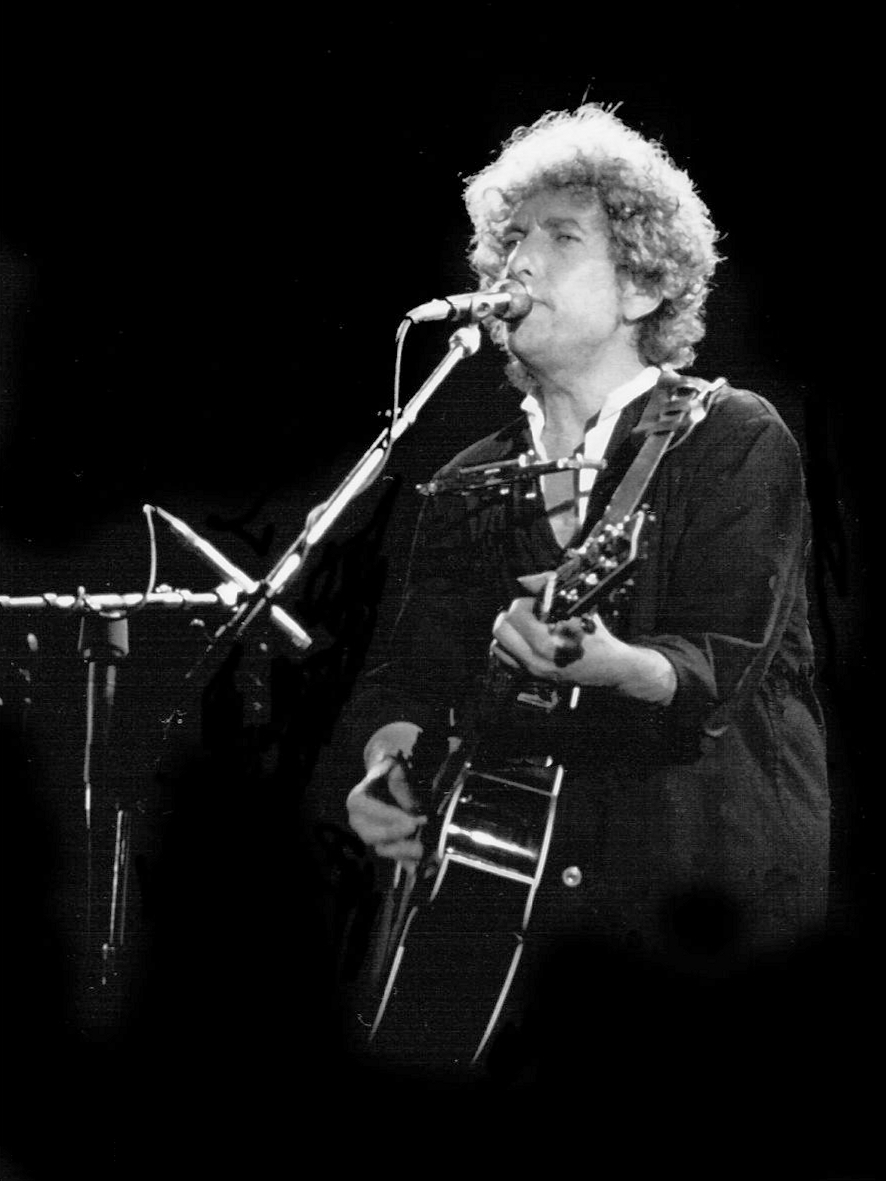 Para cuándo el Nobel de Literatura. Barcelona 1984. Siguiendo con la nostálgia, he encontrado estas fotos del concierto de Santana y Bob Dylan en Barcelona. Photographer: F. Antolín Hernandez Con estas fotos acabo la serie sobre músicos, de verdad, ¿o no? Camara: Olympus OM2 Objetivo: OM 135mm 2.8